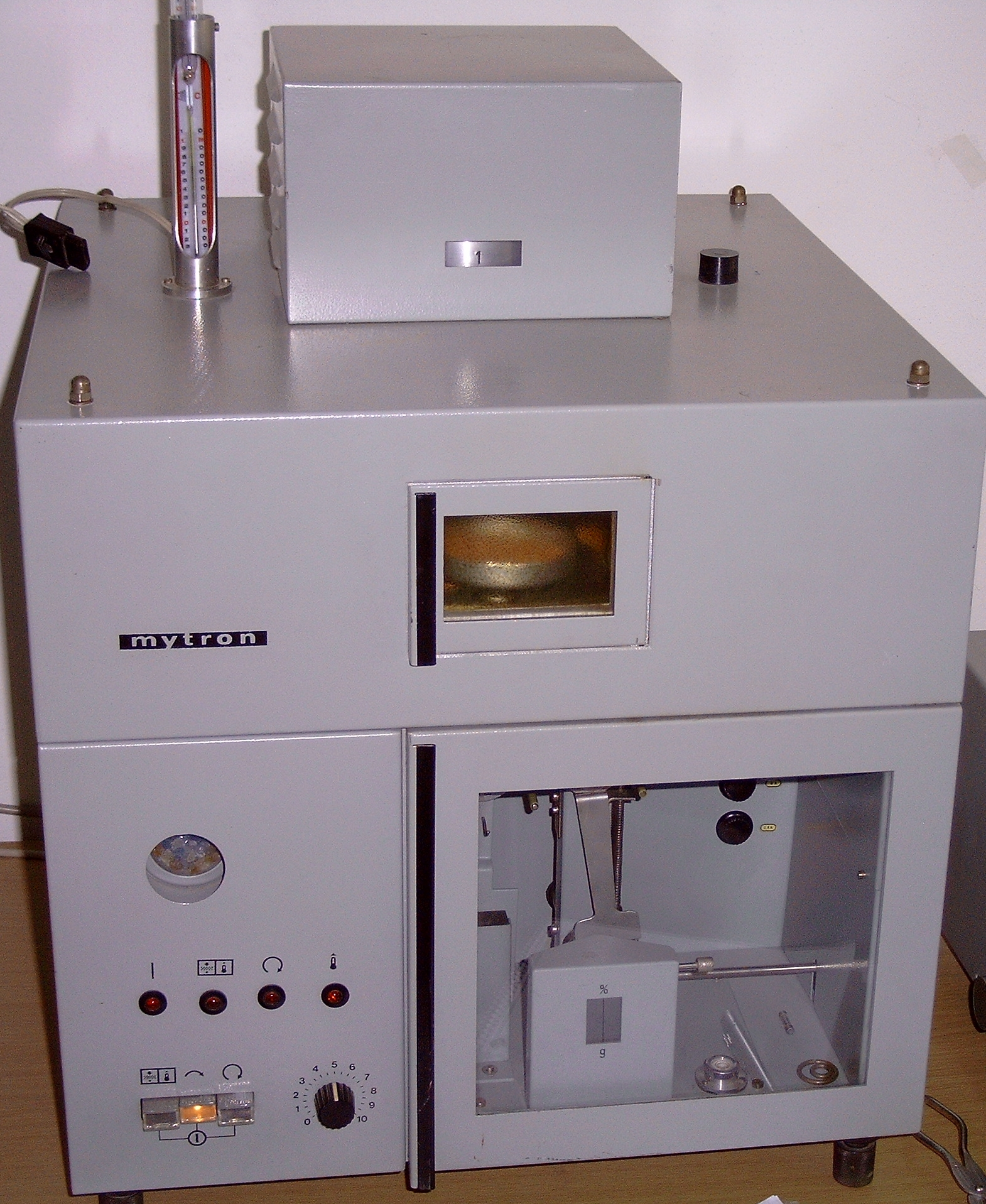 Feuchteabsolutbestimmer von Mytron aus Heilbad Heiligenstadt